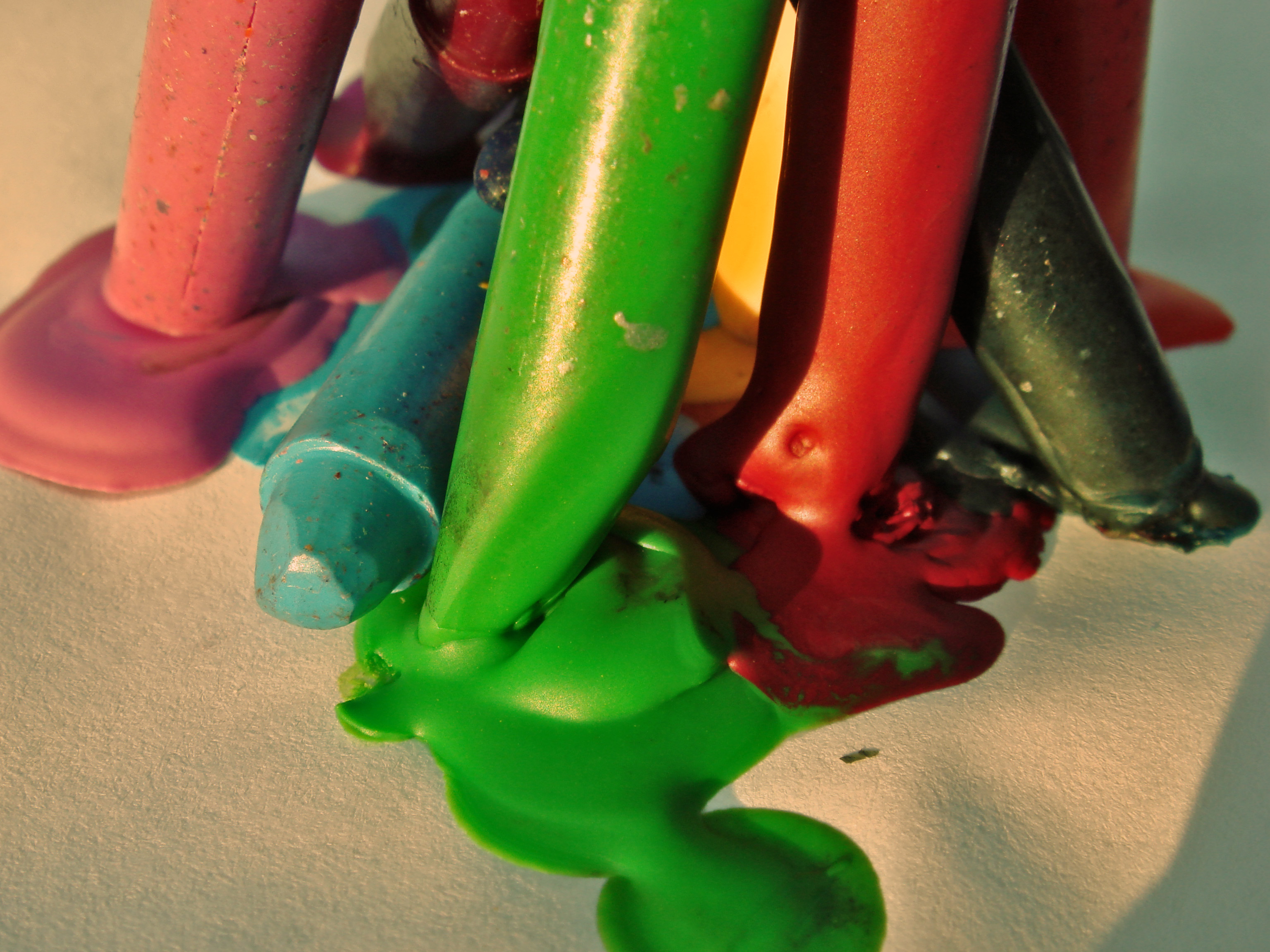 macro crayons melting